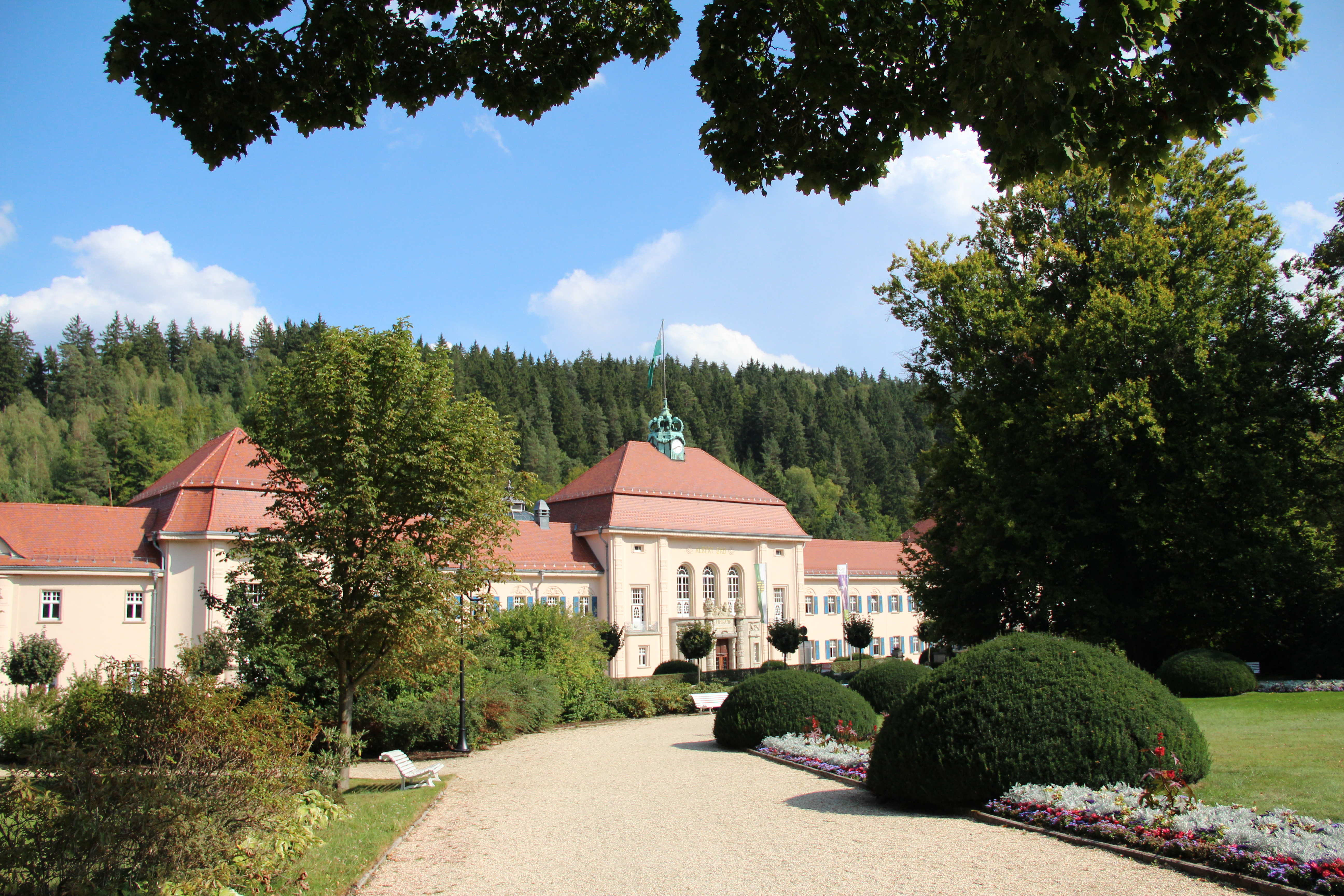 Bad Elster, König Albert Bad (Vogtland, Sachsen, 2012) - im Denkmalschutzgebiet Stadtkern Bad Elster